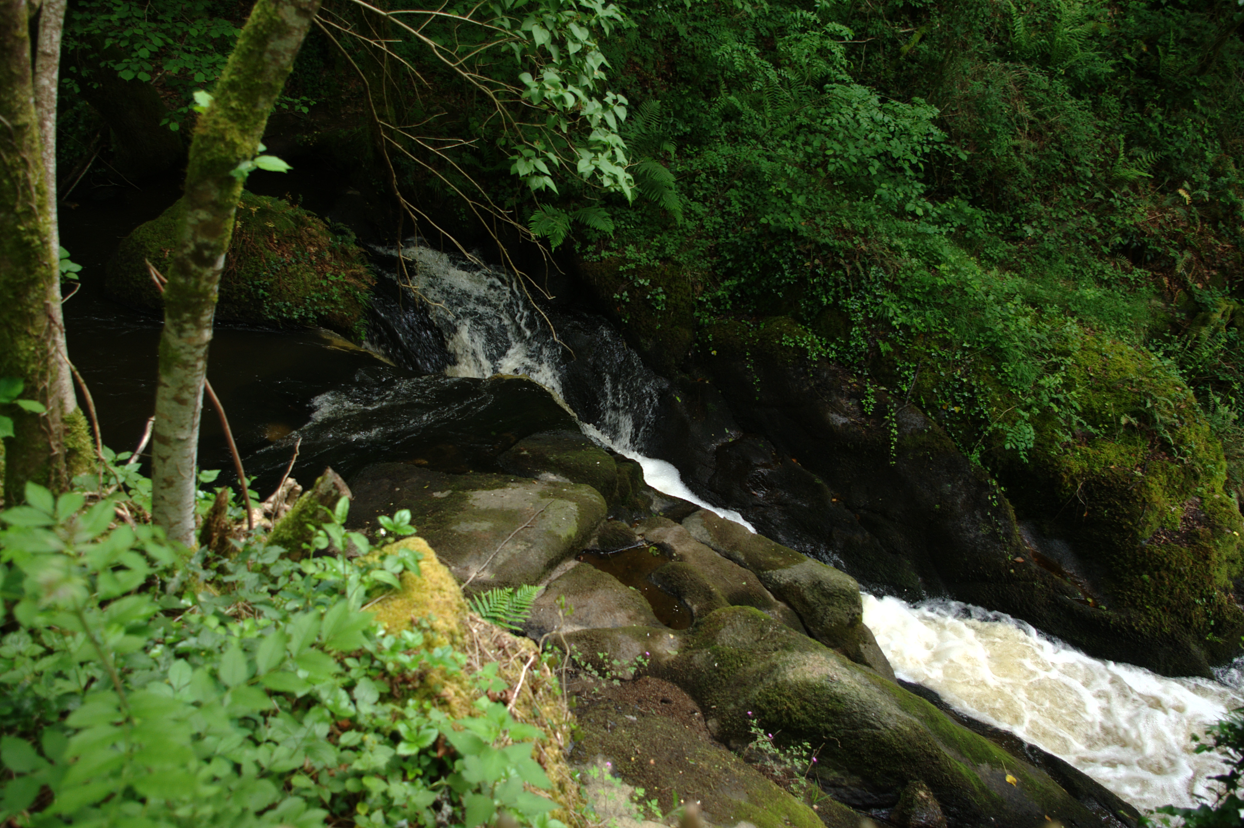 Moulin de Pinard, commune du Bourdeix, Dordogne.